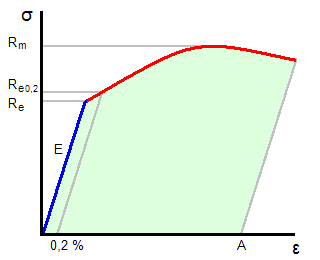 Description: Graphique de contrainte versus déformation (essai de traction) Auteur: Philippe Aubertin (Sarex) License: Domaine public Image créée pour le Wikipédia francophone